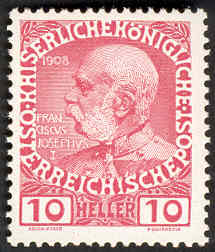 Kaiser Franz Joseph 1908 Quelle: selbst fotografiert